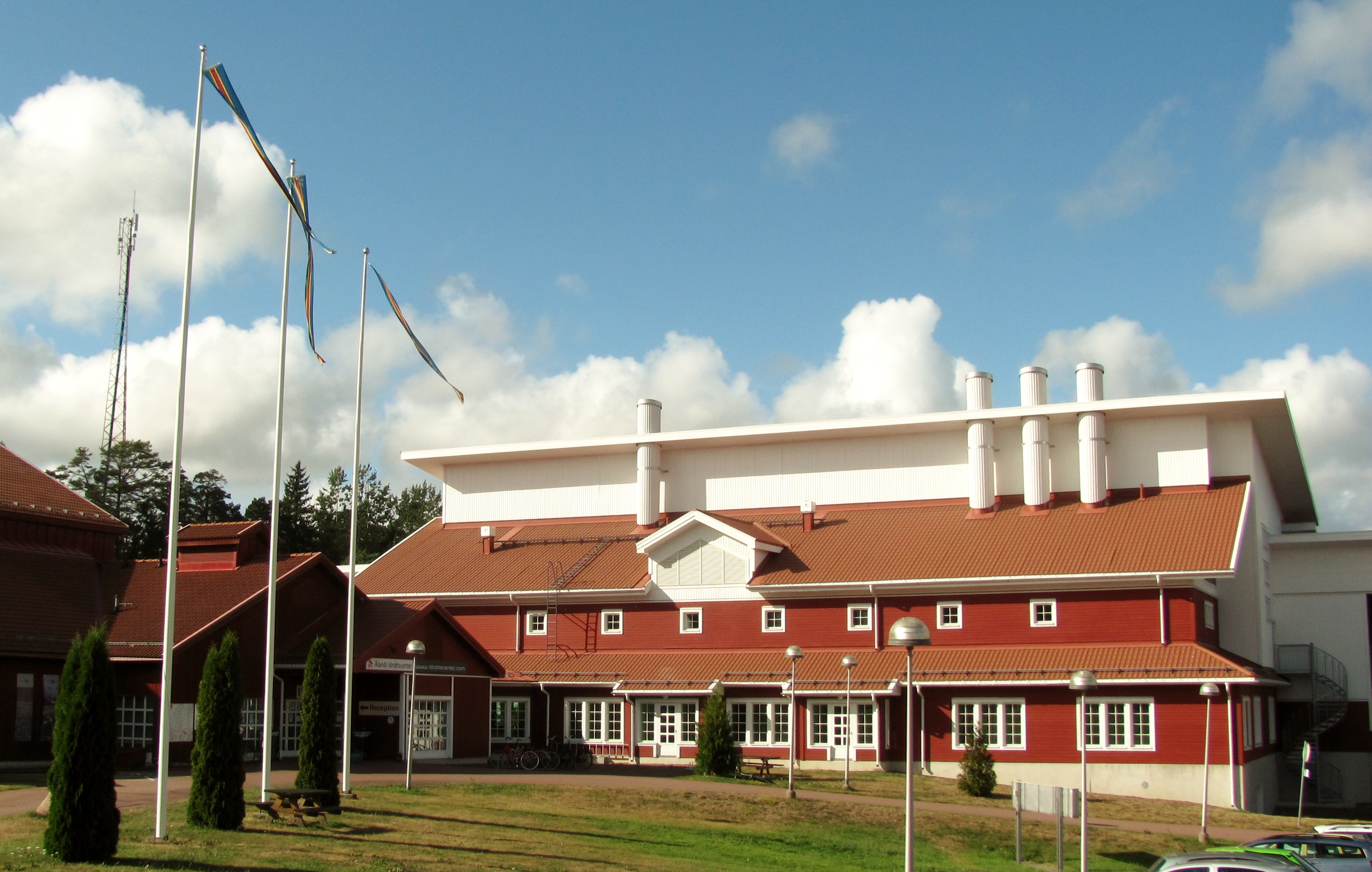 Sportzentrum, Godby, Gemeinde Finström, Åland, Finnland